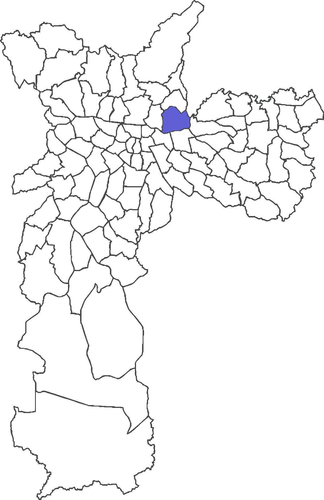 Localização do distrito de Vila Maria no município de São Paulo.